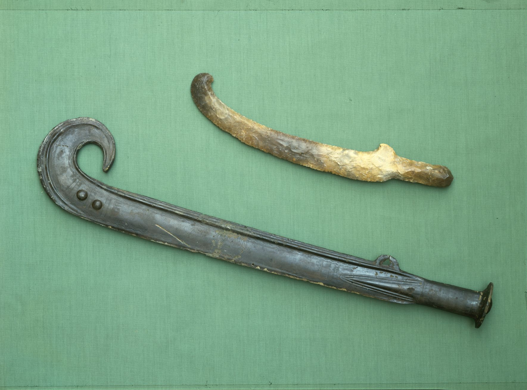 Øverst: Sværd af flint (9192). Fra Faurskov, Kerte sogn. Nederst: Krumsværd af bronze (B14174). Fra Rørby sogn.